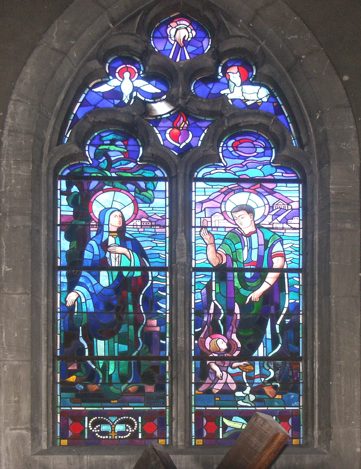 Ce vitrail représentant Ste Monique et St Augustin à Ostie a été réalisé par les Ateliers BENOIT Frères de Nancy. On peut le voir dans l'église Saint-Laurent de Pont-à-Mousson. Don du Docteur André REMY et de Madame, née Marie-Louise GREFF.